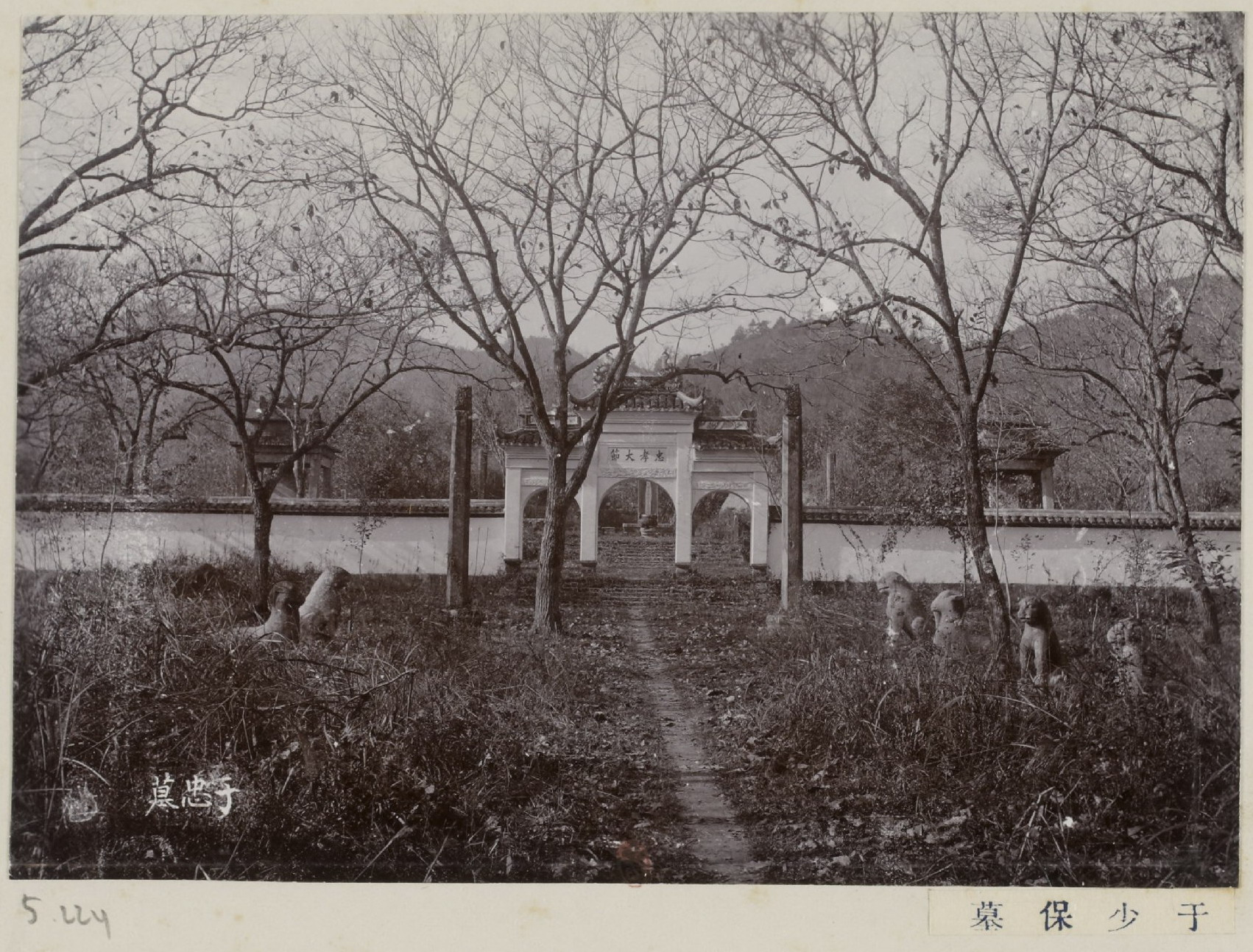 于谦墓，摘自《西湖风景》，由杭州二我轩照相馆摄于1911年。